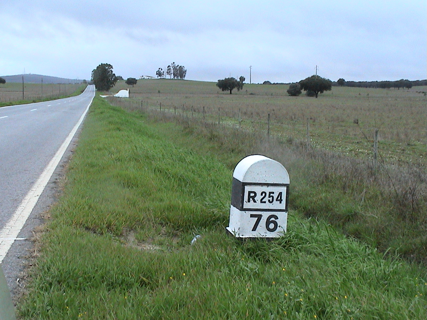 [Estrada Nacional 254 • Km 76]